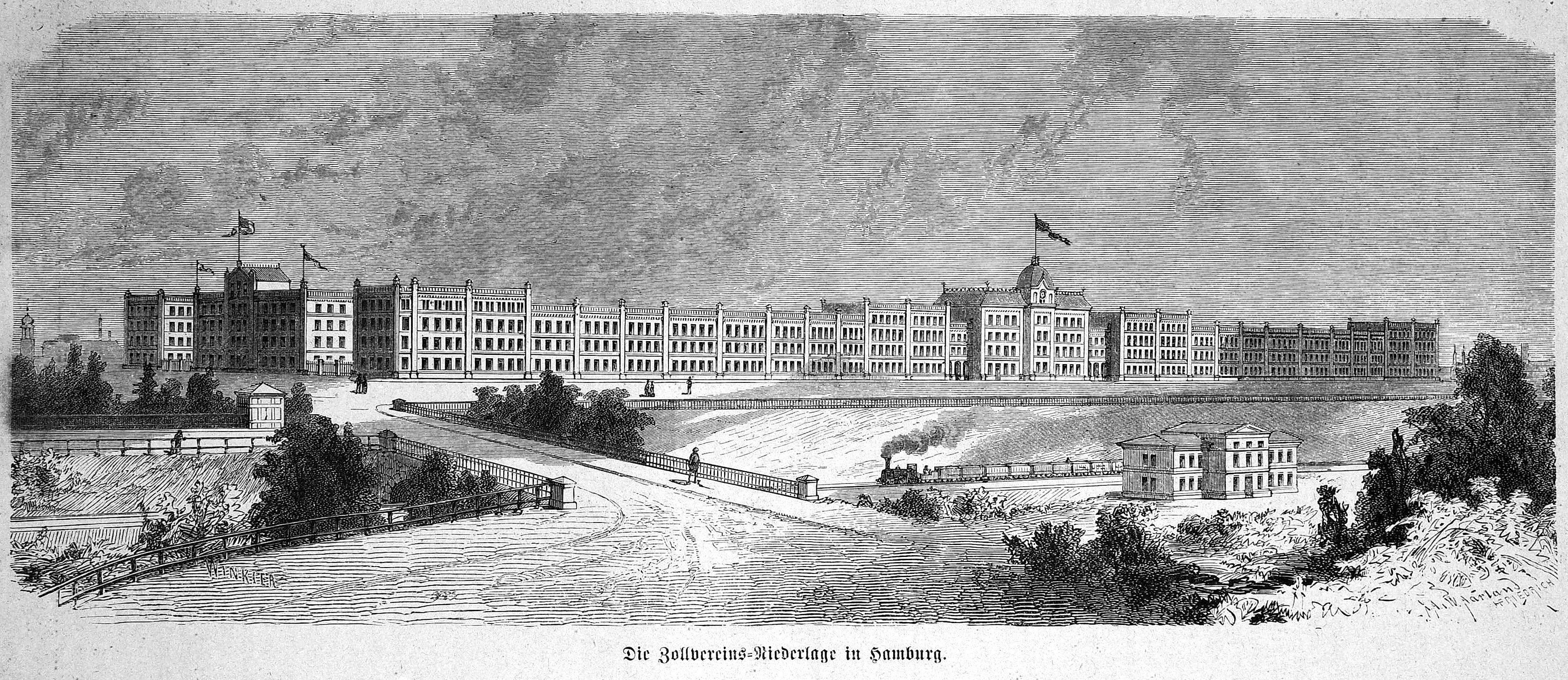 Bild von Seite 568 der Zeitschrift Die Gartenlaube. Image from page 568 of journal Die Gartenlaube, 1871.